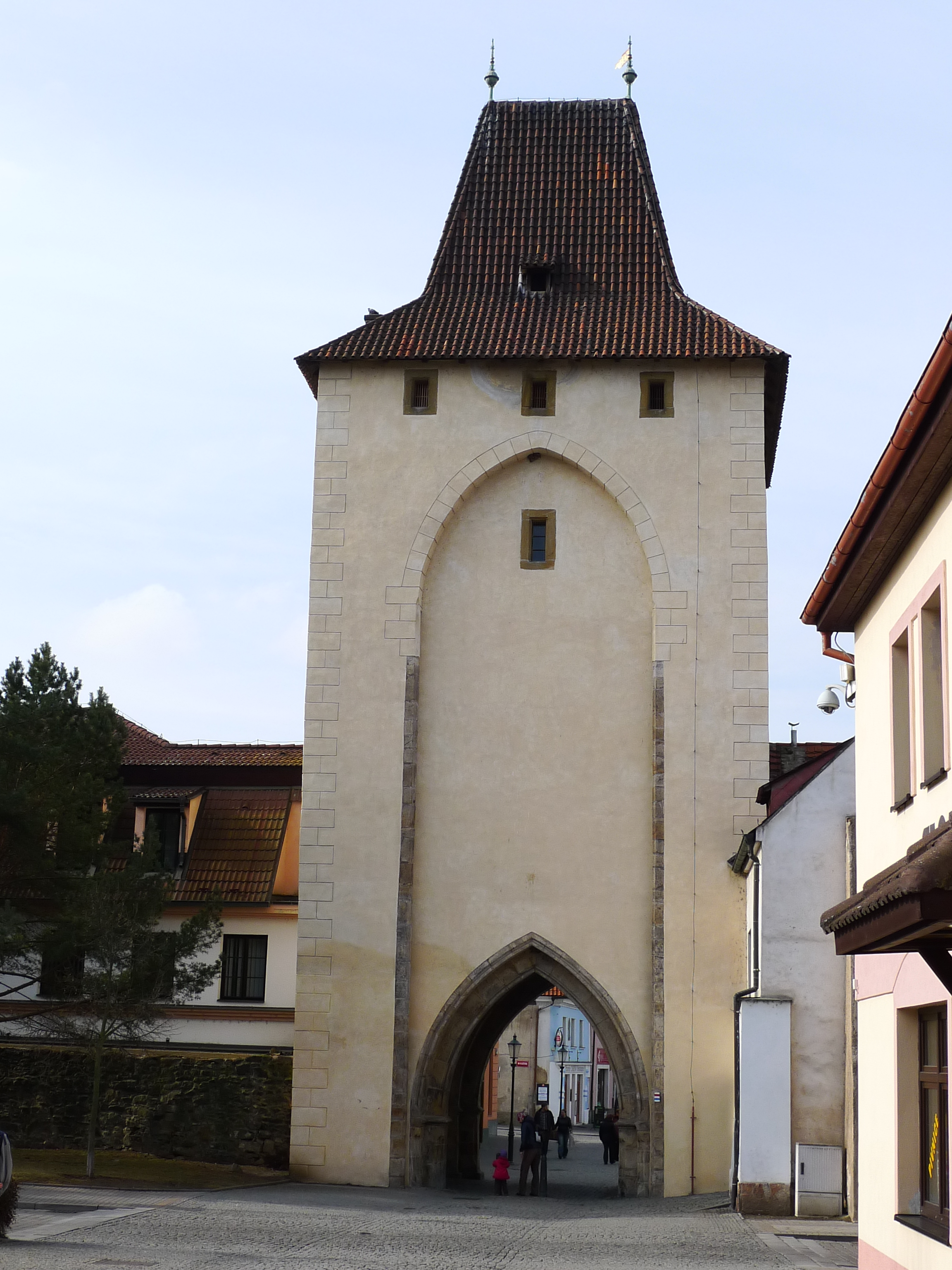 Městské opevnění (Beroun), Beroun